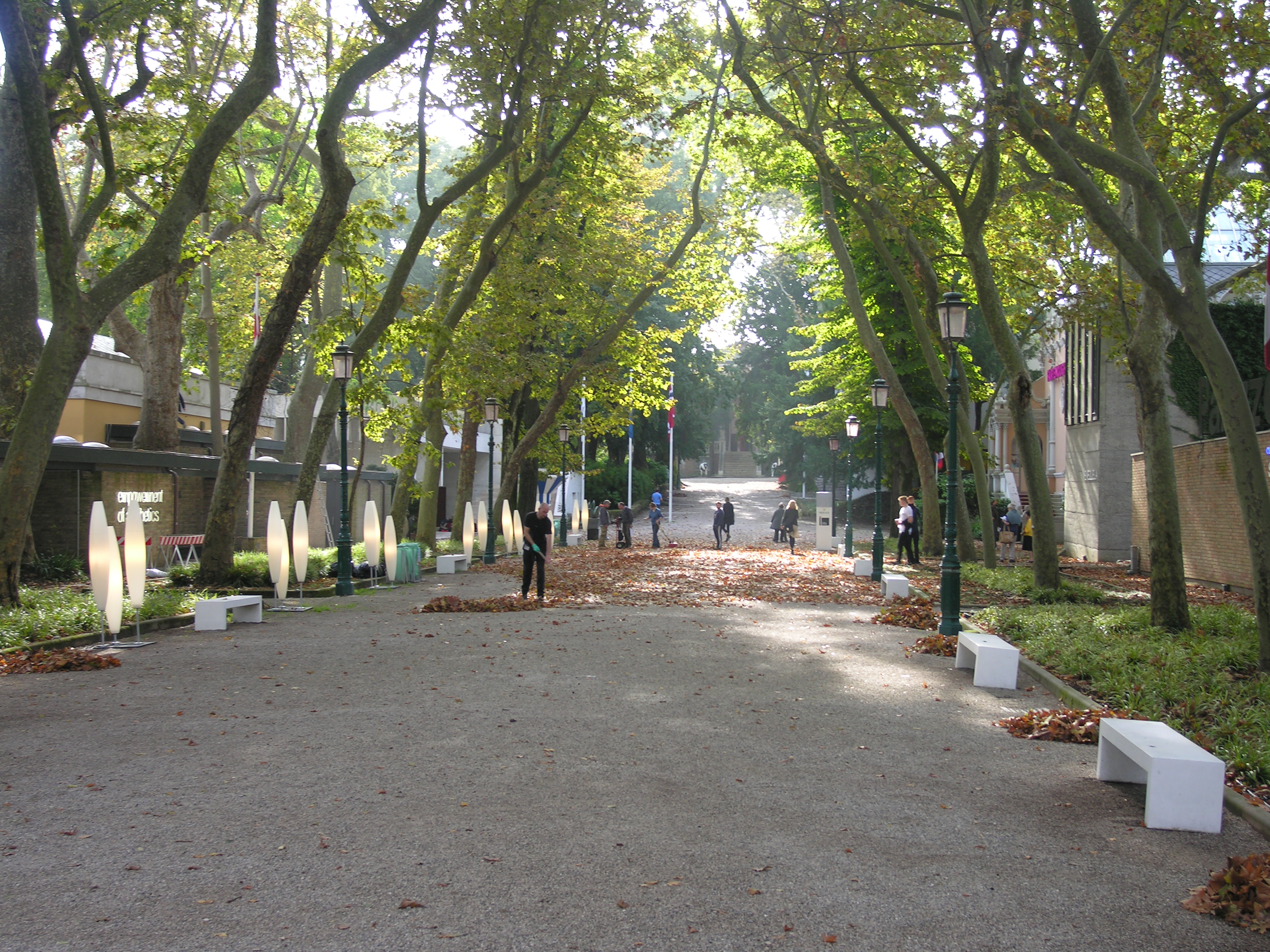 Cannaregio, 30100 Venice, Italy